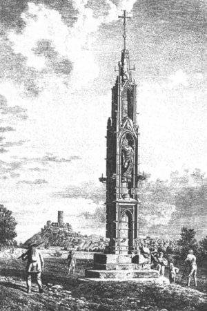 Das Hochkreuz in Bonn, Lithographie von P.Schieffer vor 1859